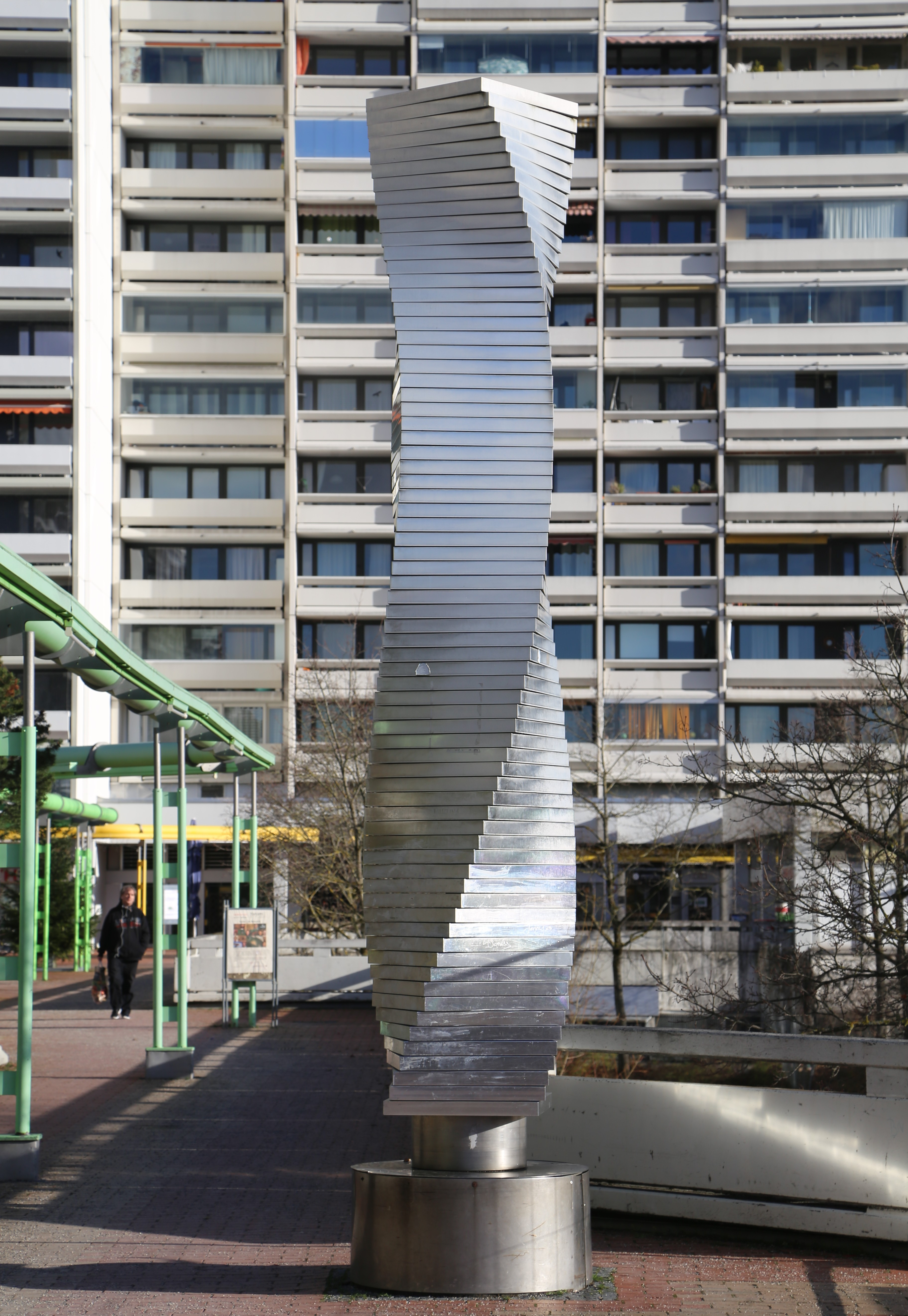 Roland Martin: Silbersäule, 1972, Aluminium, Olympisches Dorf, Nadistraße 3, München